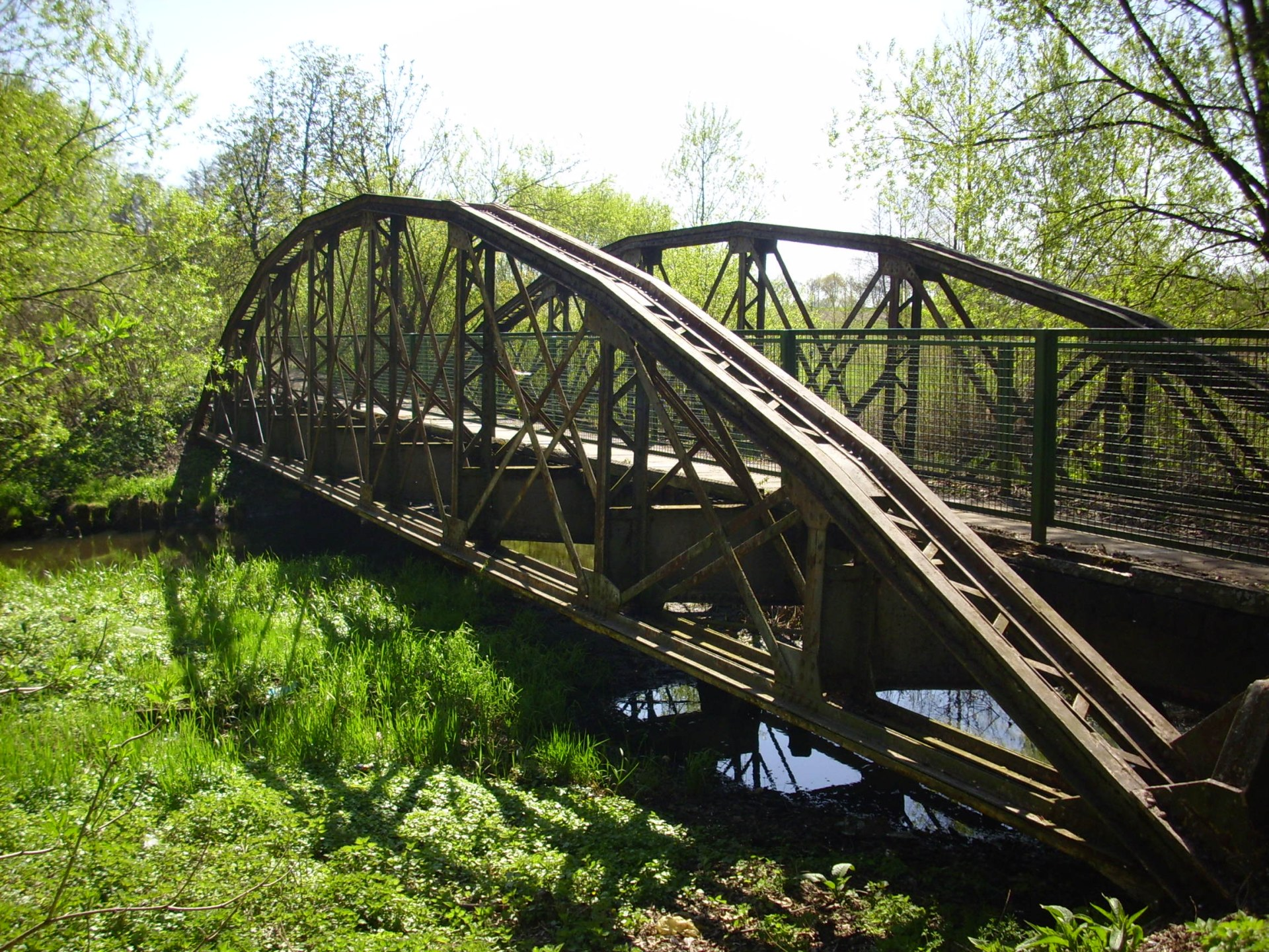 Roskosz, powiat bialski. Dawny most Bialskiej Kolei Dojazdowej nad rzeką Klukówką.